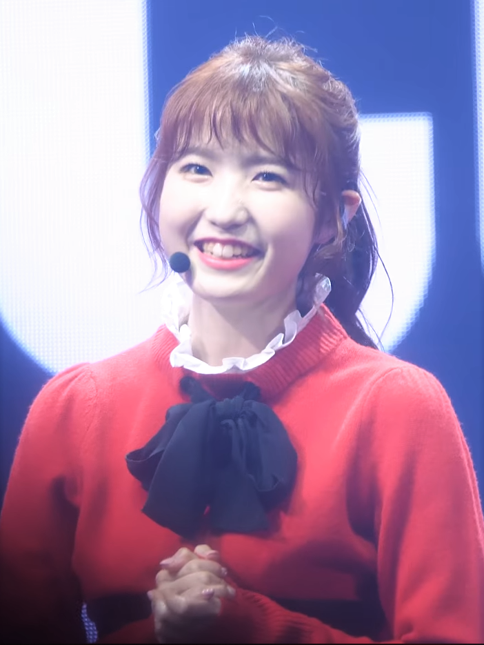 아이즈원 (IZ*ONE) '멤버별 데뷔소감' 직캠 Fancam @IZ*ONE SHOW-CON